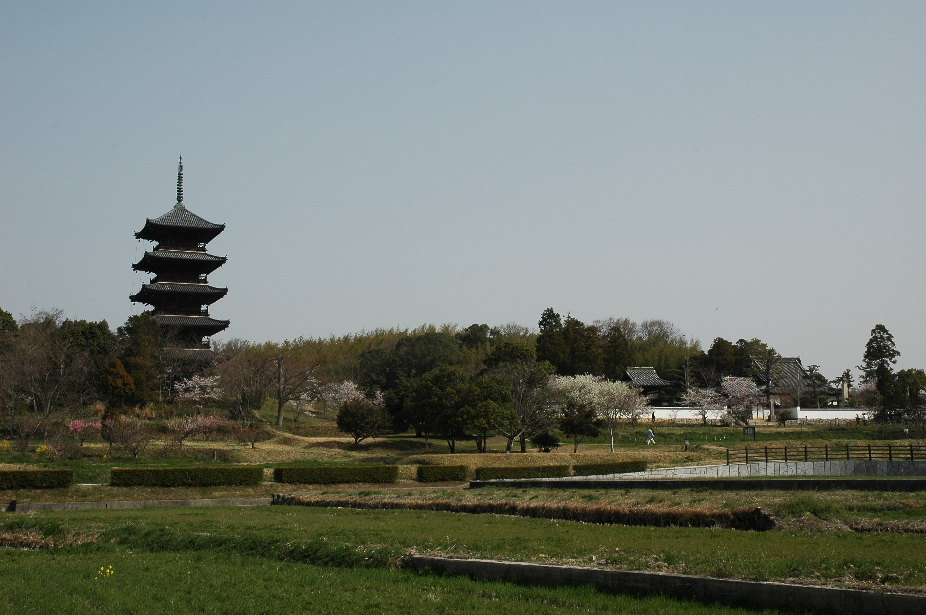 view of Bitchu Kokubunji